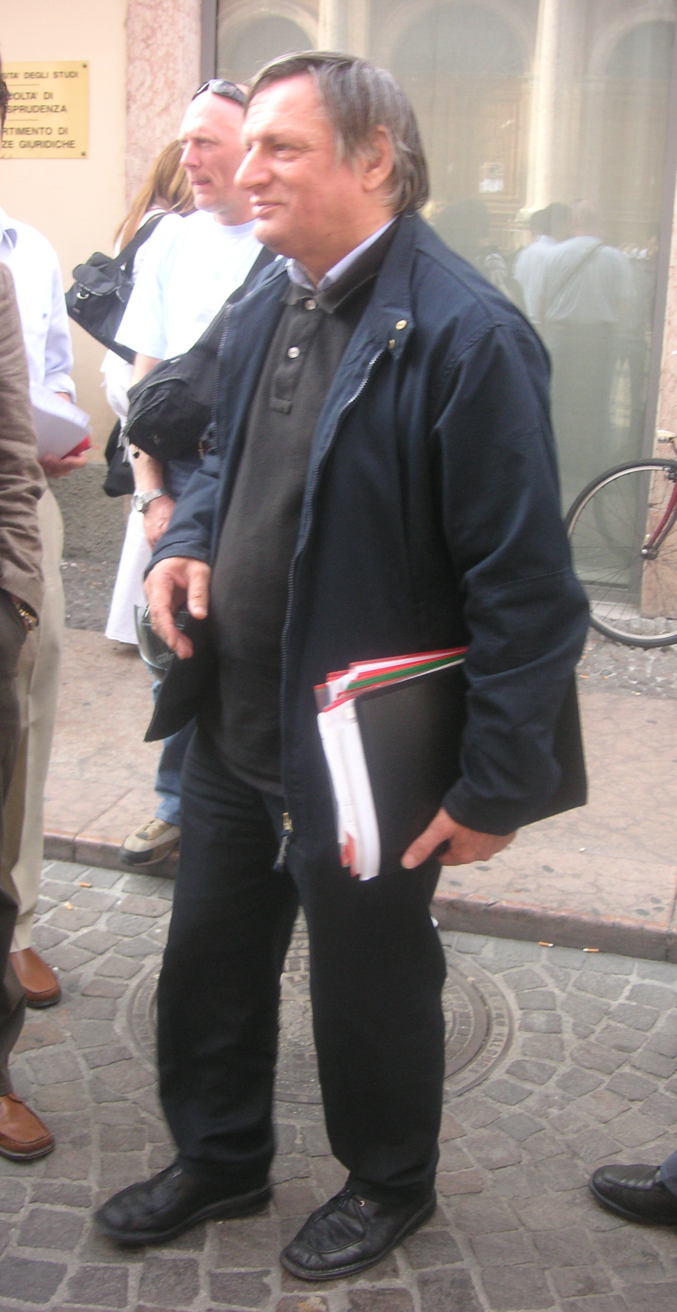 Don Luigi Ciotti a Trento